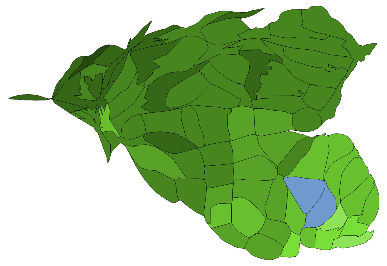 顏色對照表